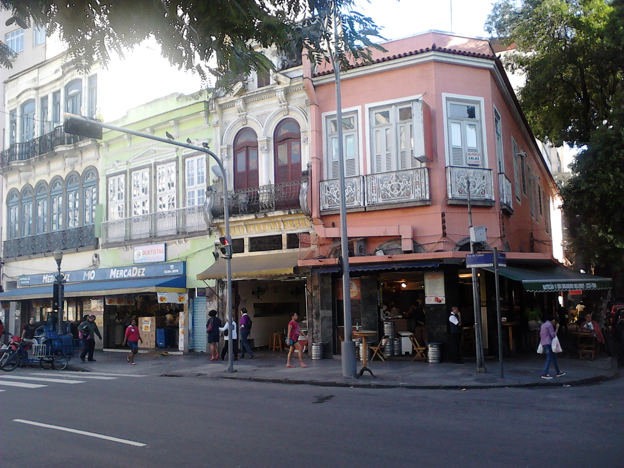 Casarões na Rua do Catete, Rio de Janeiro, Brasil.